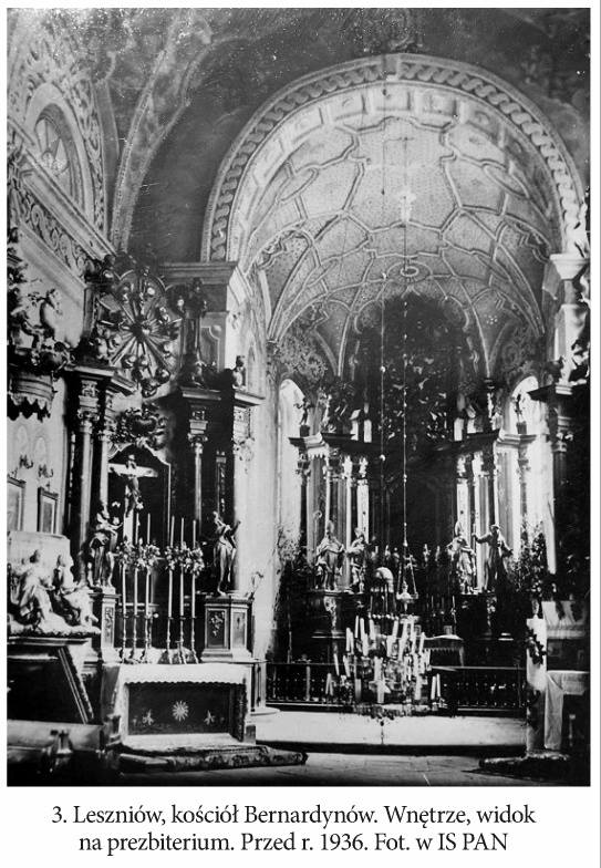 Інтер'єр костелу Лешнів